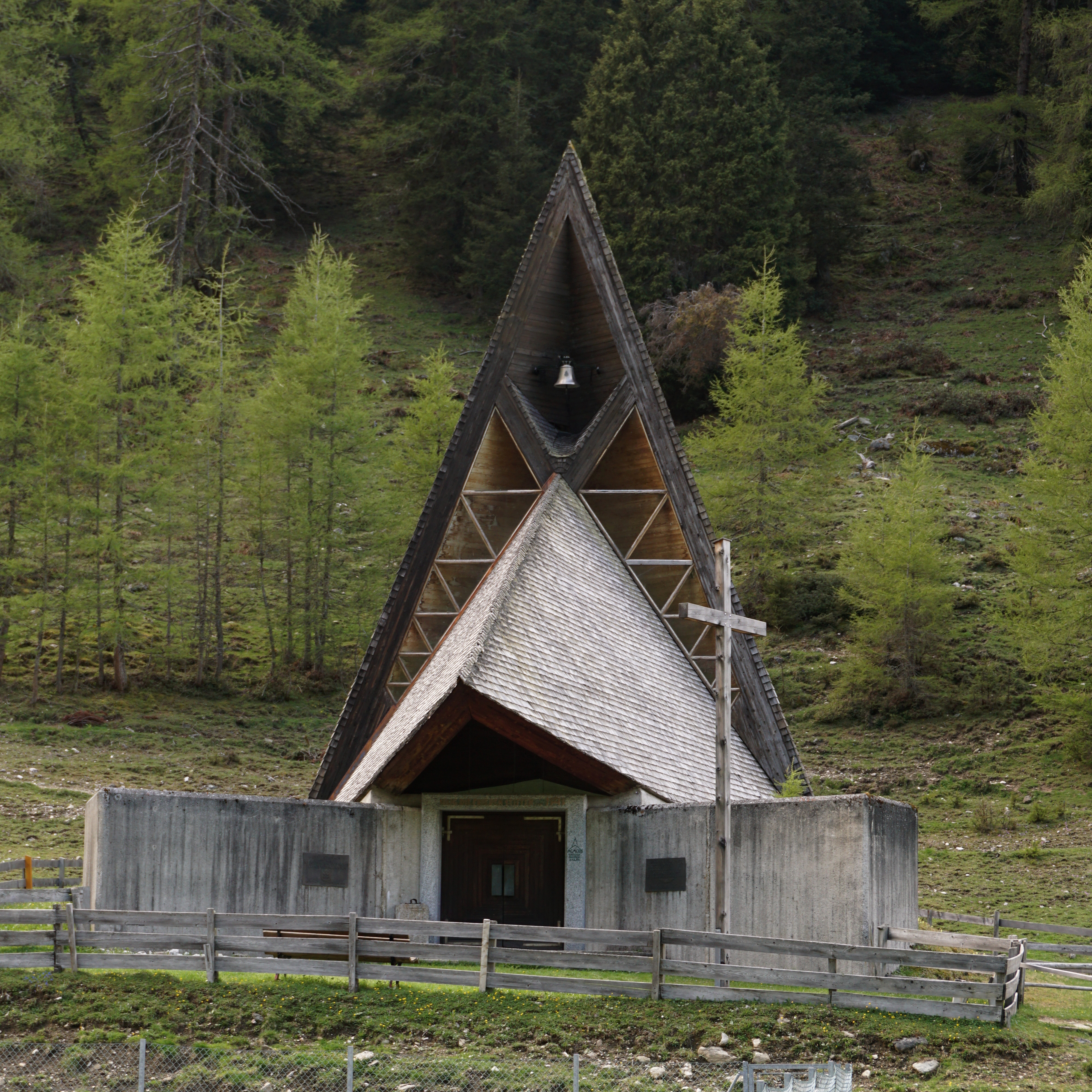 Ansicht von Osten/vorne. This media shows the remarkable cultural object in the Austrian state of Tyrol listed by the Tyrolean Art Cadastre with the ID 28775. (More images on Commons)